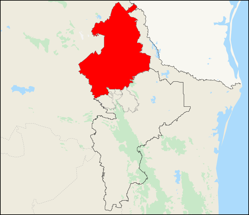 Mapa del distrito electoral federal 7 ubicado en Nuevo León